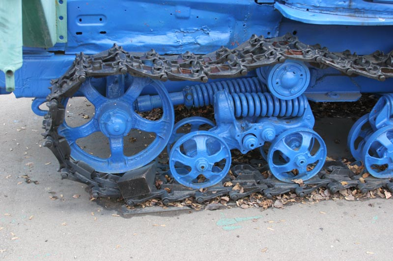 Дождевальна машина ДДА-100 МА на базе трактора ДТ-75 в Саратове на Соколовой горе. Элементы ходовой части